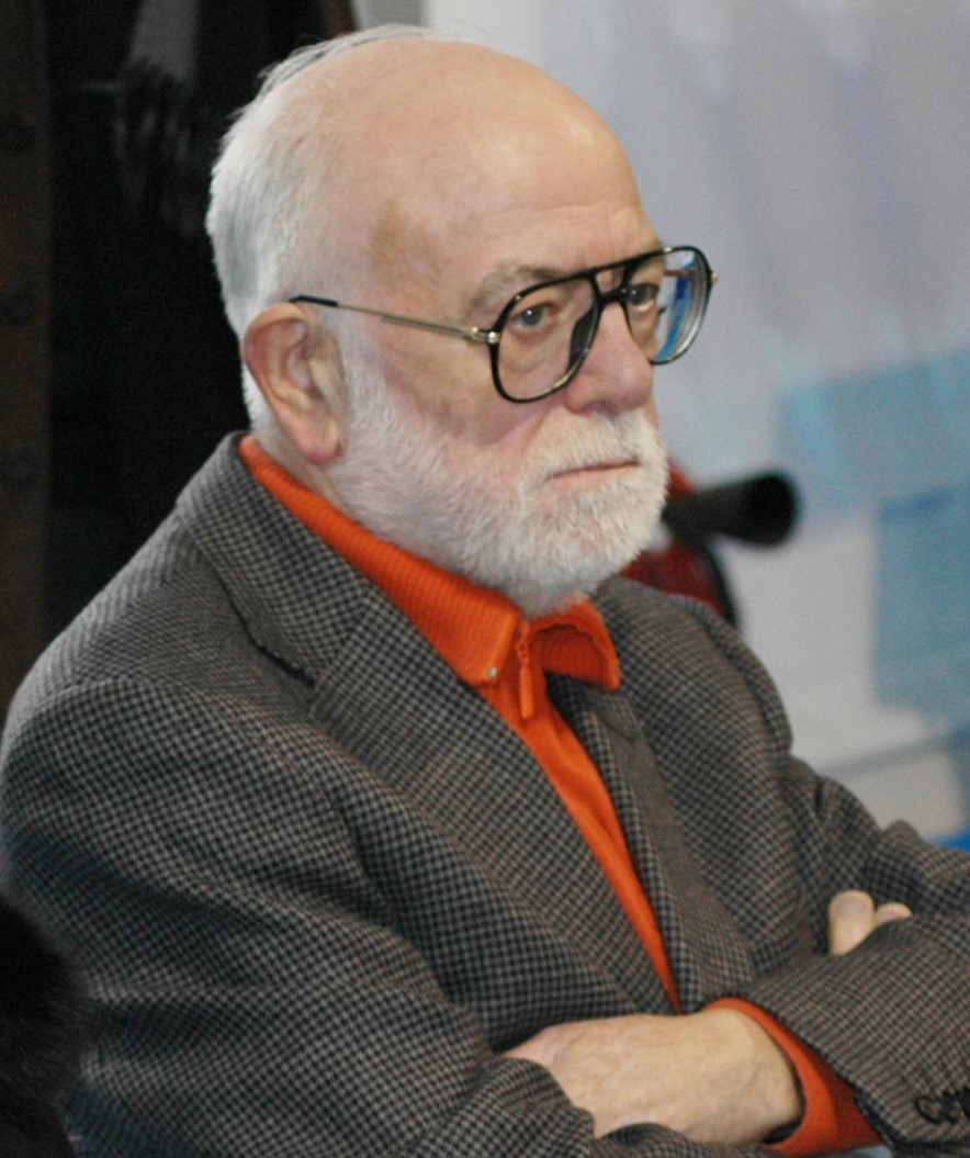 Xavier Dalfó i Hors el 2009